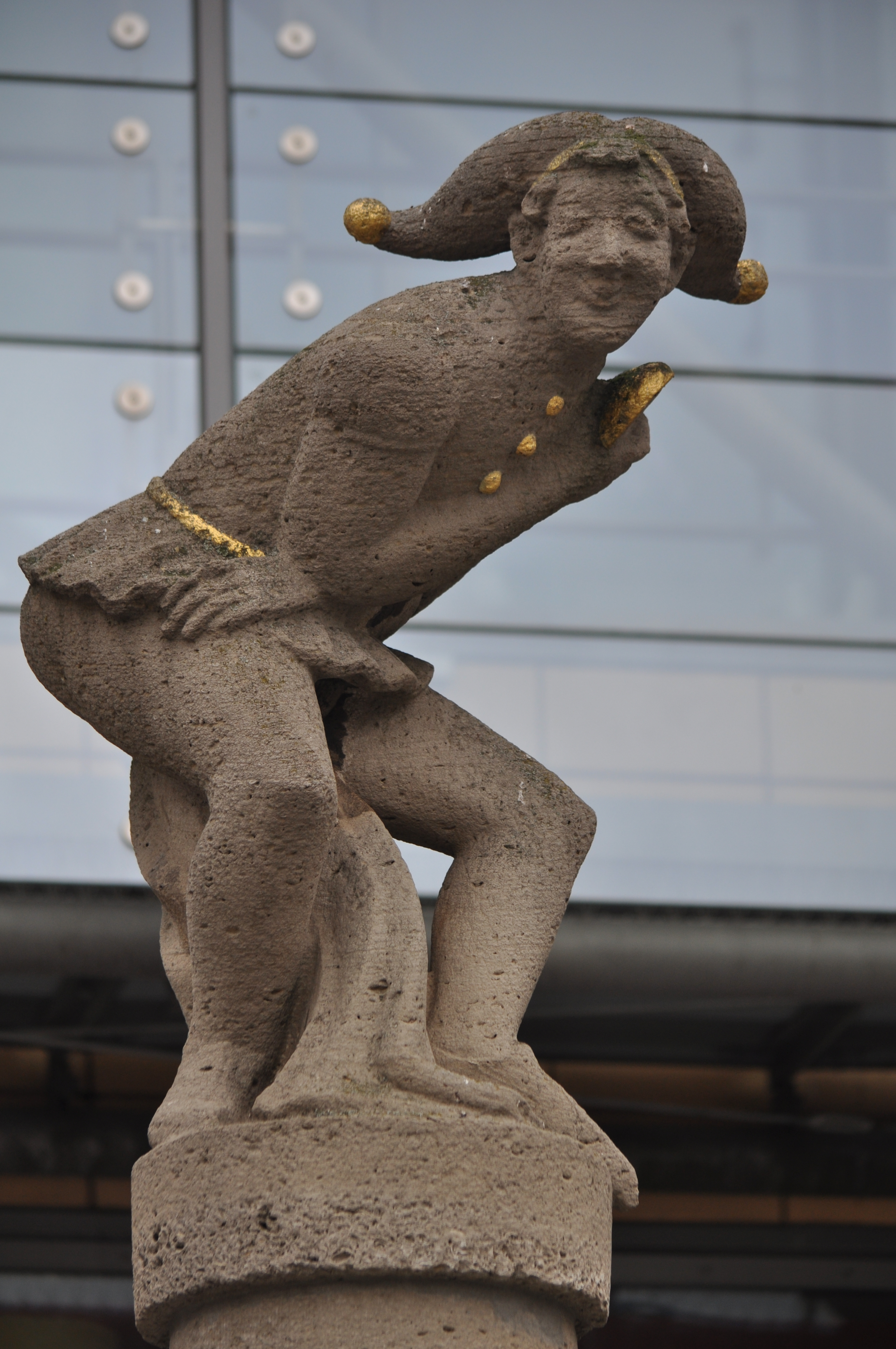 Statue auf dem Eulenspiegelbrunnen in Magdeburg-Altstadt. This is a photograph of an architectural monument.It is on the list of cultural monuments of Magdeburg